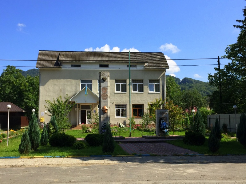 Будинок сільської ради та пам'ятник солдатам, що загинули під час Другої світової війни